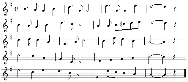 Melodie van Limburg mijn Vaderland, het officiële Limburgse volkslied. Geschreven door onderwijzer Gerard Krekelberg in 1909. De melodie is gecomponeerd door Hendrik (Henri) Tijssen.